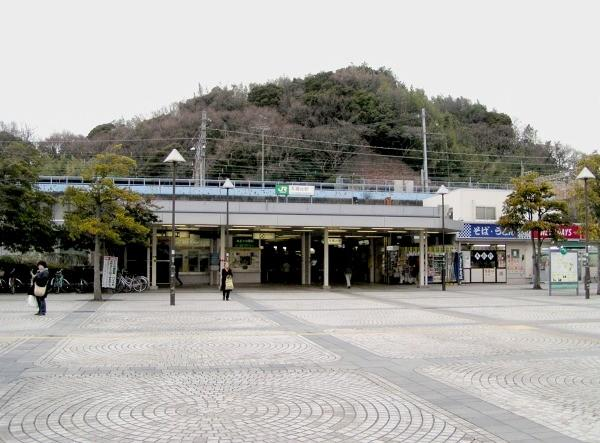 Hongōdai Station, on the Keihin-Tohoku and Negishi Lines, Sakae-ku, Yokohama, Kanagawa, Japan 本郷台駅